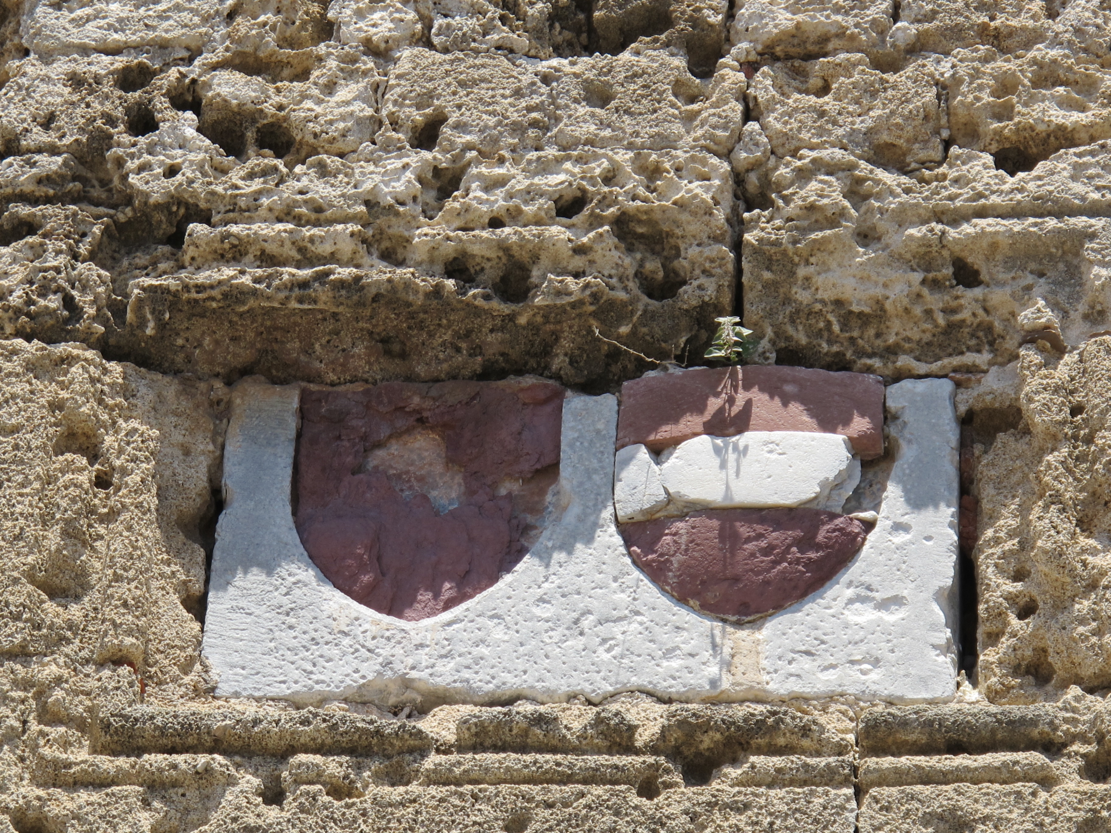 Rodi, porta sant'atanasio, cavalcavia 04 stemma jean de lastic